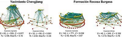 food web